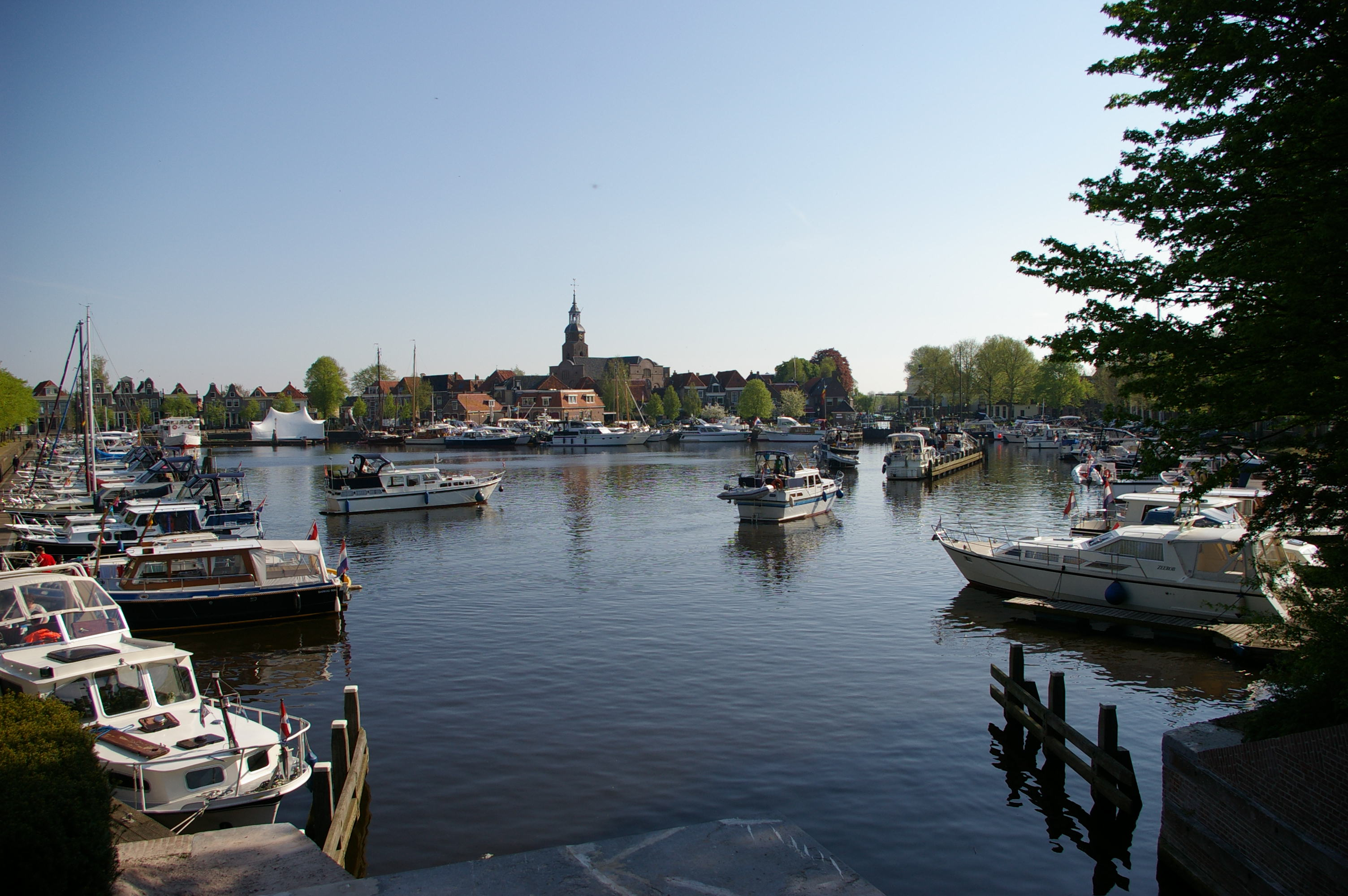 Harbour of Blokzijl, municipality of Steenwijkerland, Overijssel, the Netherlands.